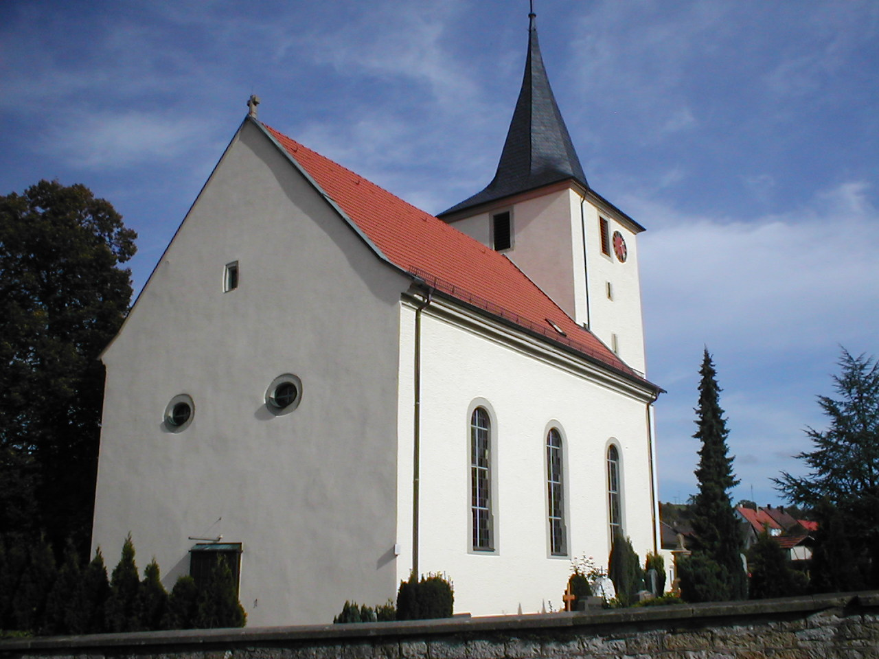 Ev. Kirche St. Ulrich in Siglingen